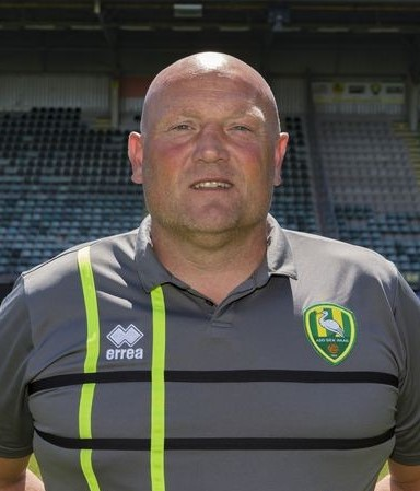 Dirk Heesen